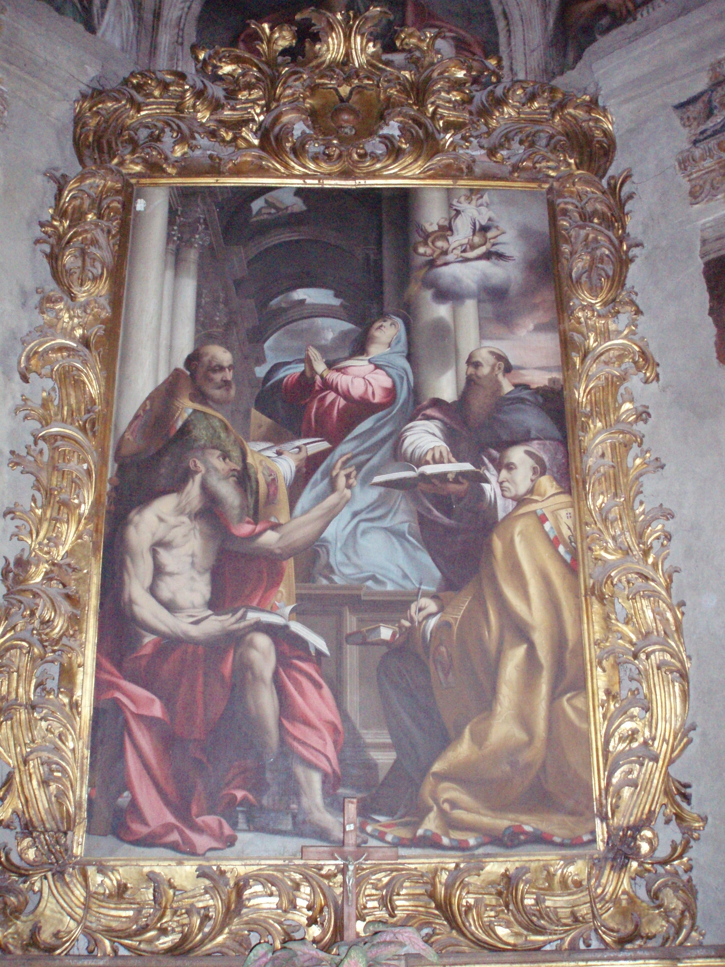 L'Immacolata Concezione del Pordenone nella cappella dei Pallavicino nella chiesa dei frati